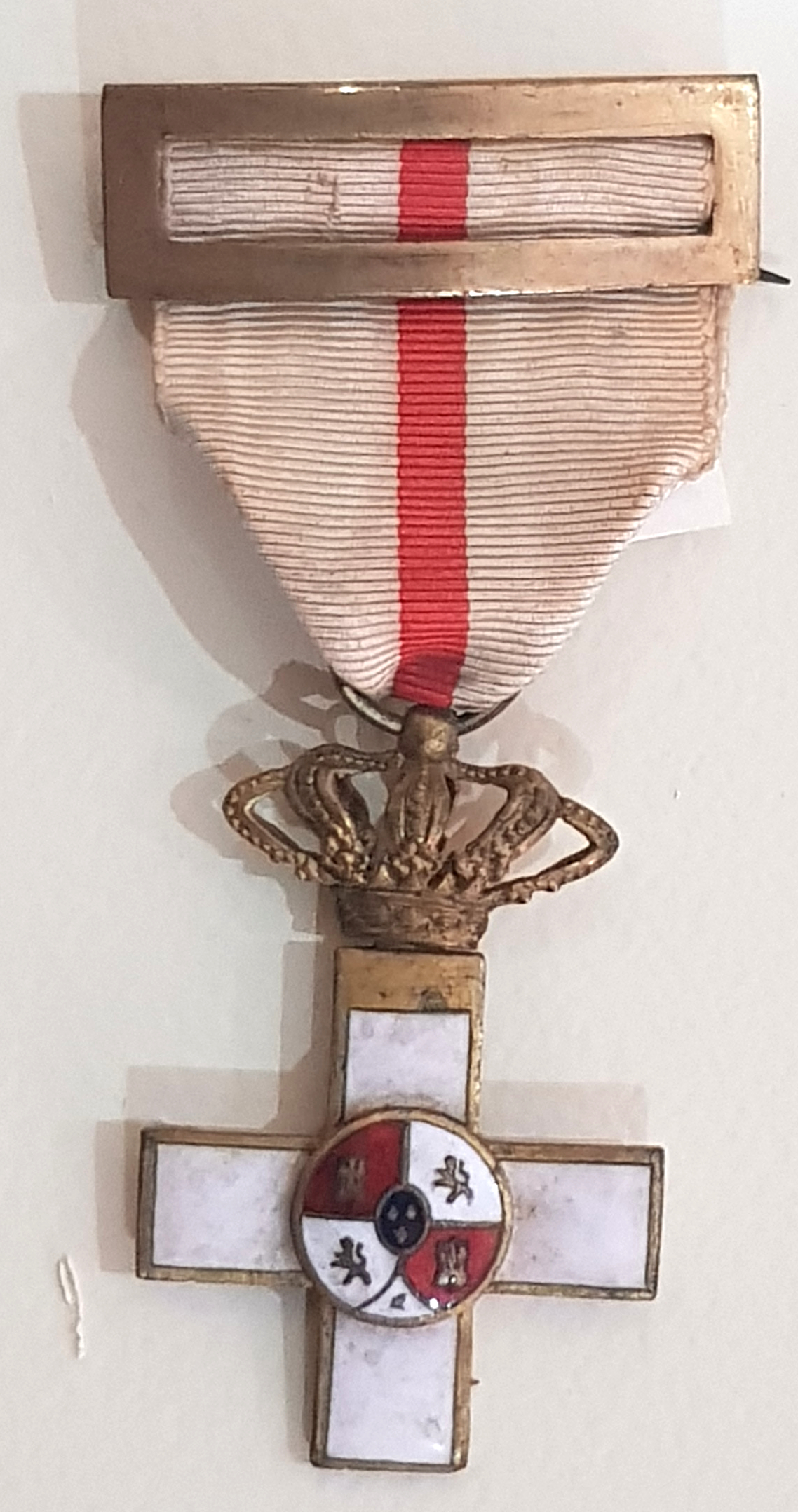 Spanischer Militärverdienstorden (Orden del Mérito Militar) für subalterne Offiziere, Kadetten, Unteroffiziere und Mannschaften des Heeres. Die hier gezeigte Variante Cruz, 1a clase distintivo blanco, hier in der Ausführung 1868, war die unterste Stufe dieser Klasse.